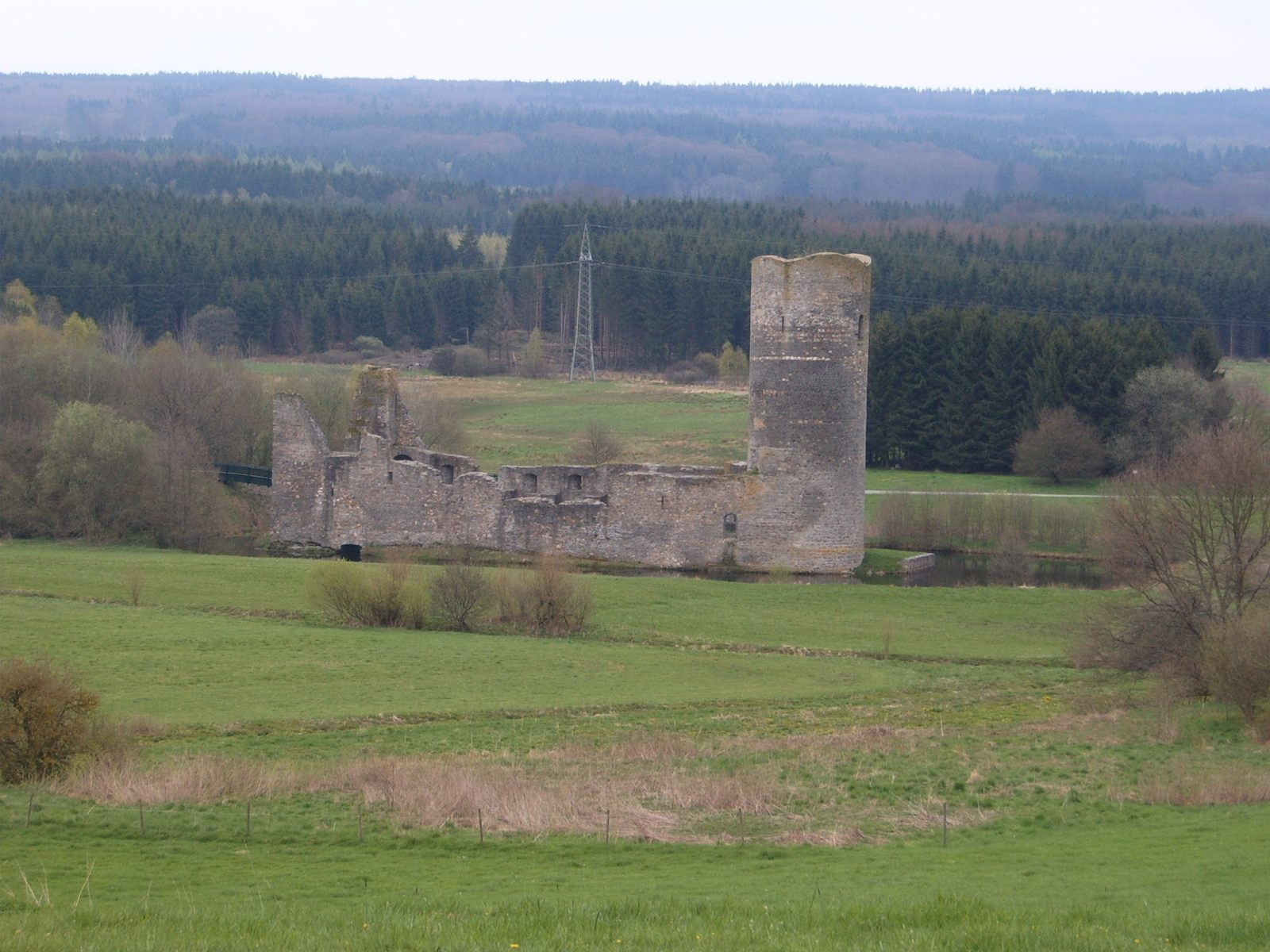 Beschreibung: Burg Baldenau Quelle: selbst fotografiert Fotograf: Matw